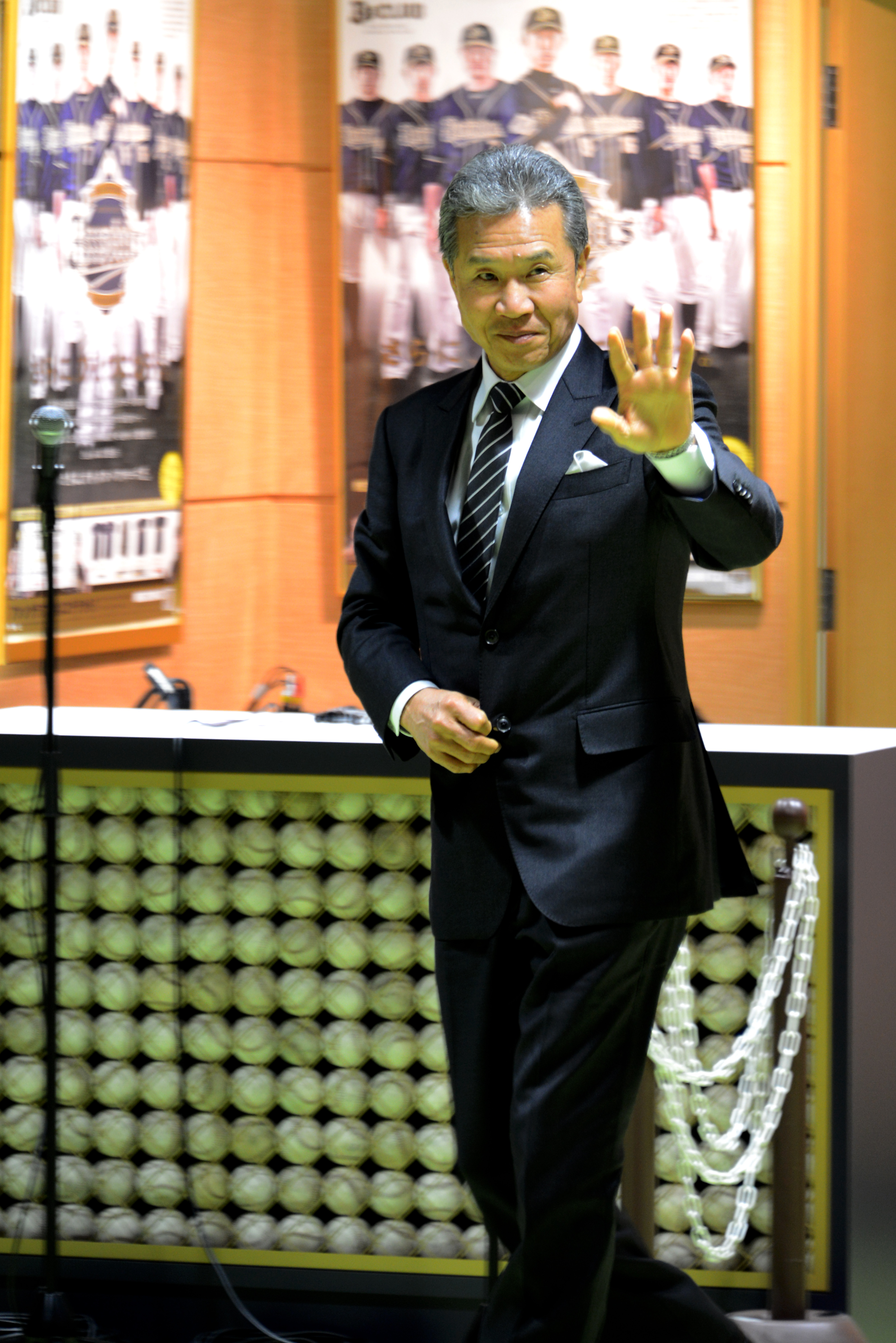 Mar 7, 2014 at 16:58, Osaka 京セラドーム